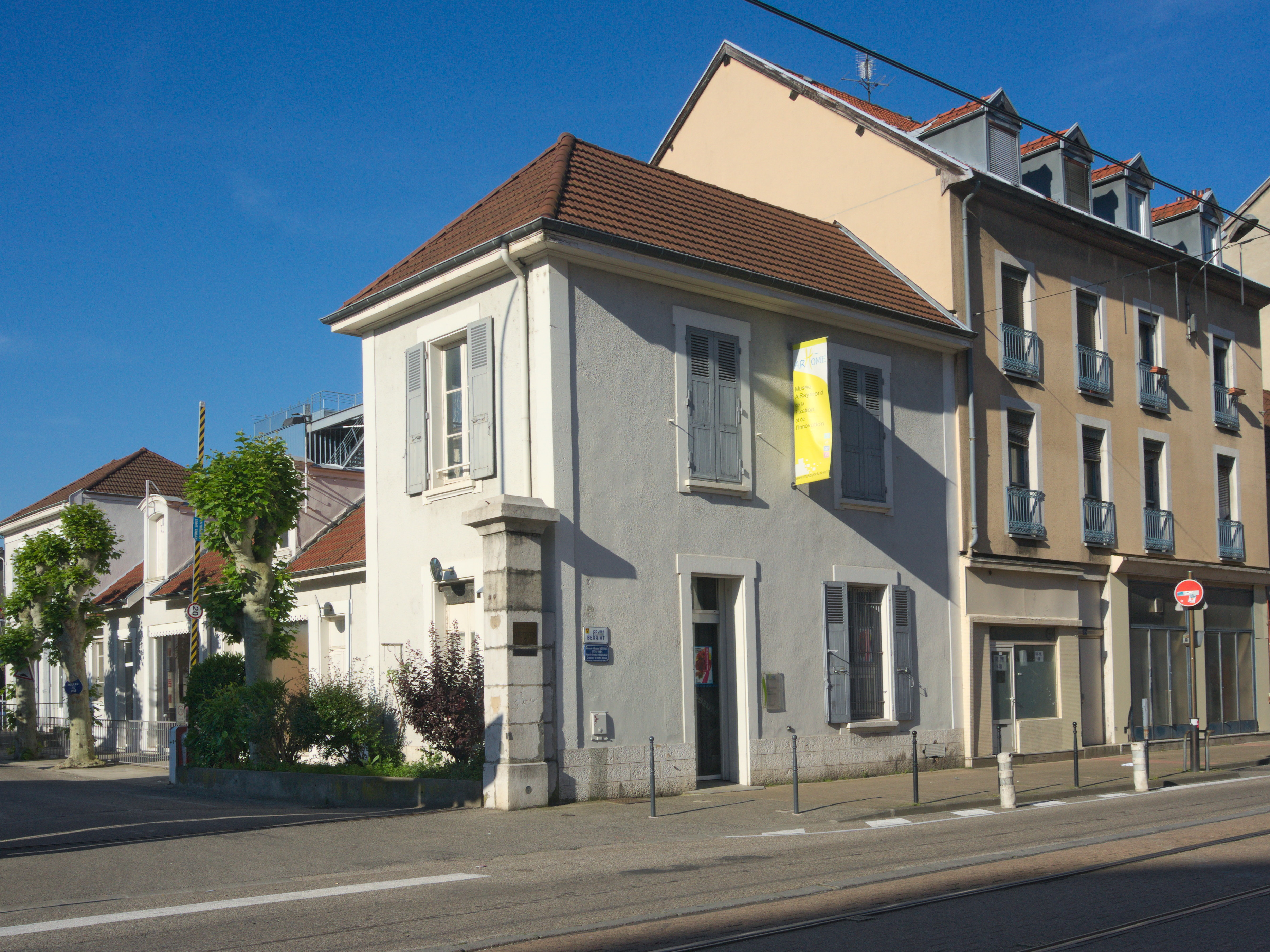 Le Musée de l'entreprise A.Raymond à Grenoble, consacré à la fixation et l'innovation industrielle